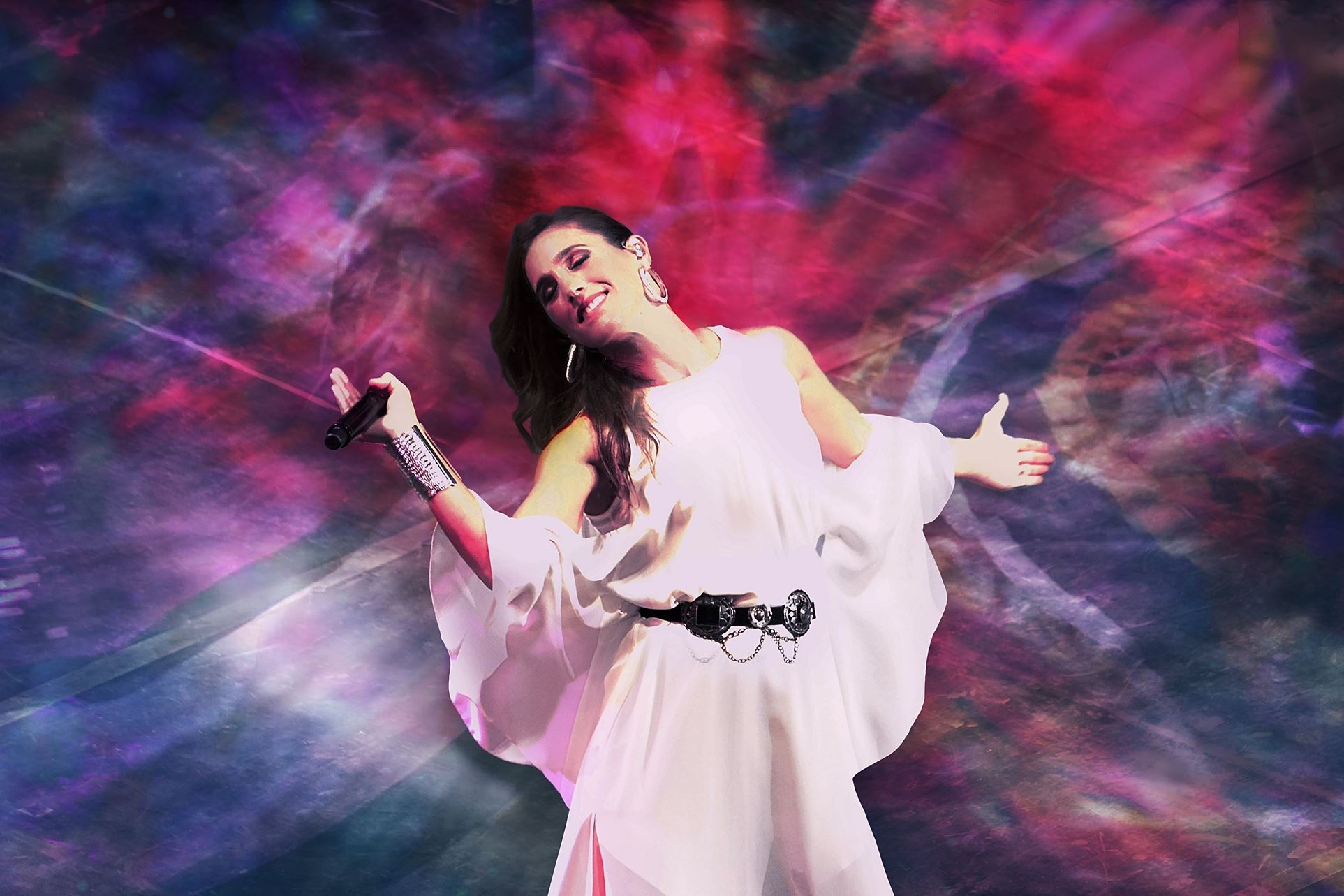 Soledad Pastorutti en su presentación en el Festival Internacional de Peñas de Villa María 2018.